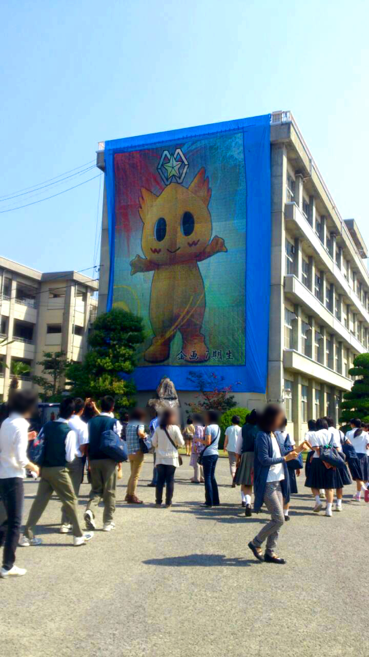 40周年記念文化祭で展示された巨大モザイクアート。 西校のマスコットキャラクター「ウェッピー」を中心に、学校行事での縦割りグループである「暁雲」「青穹」「銀嶺」「蒼龍」のイメージカラー４色がそれぞれのグループの紹介文のイメージに合わせた形でデザインされている。 モザイクの一つ一つのタイルは学校行事や修学旅行中の生徒や教員、風景の写真計64800枚で作られている